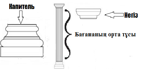 Бағананың элементтері